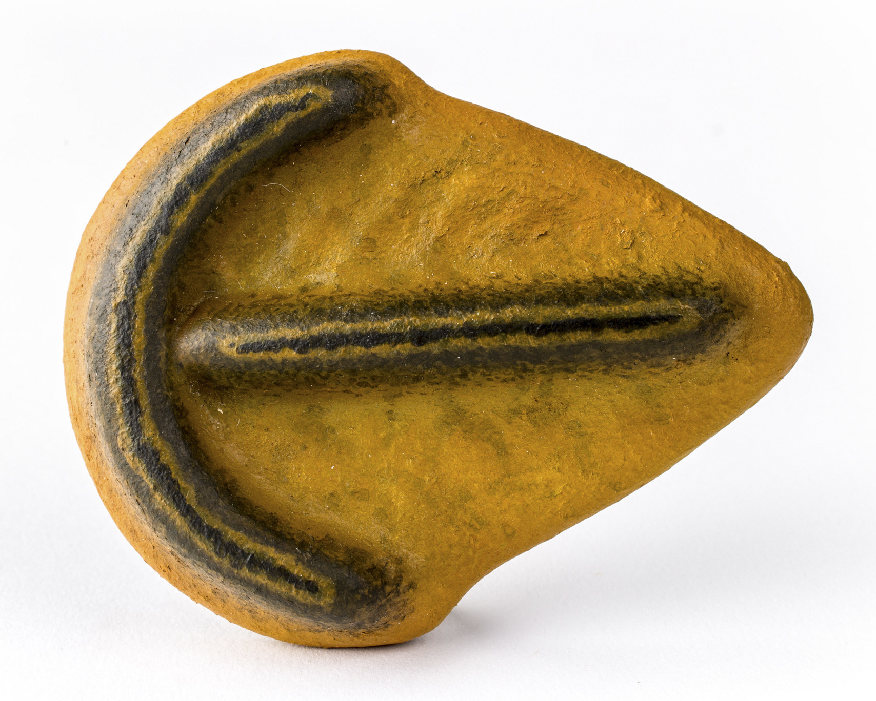 Ricostruzione in scala 10:1.